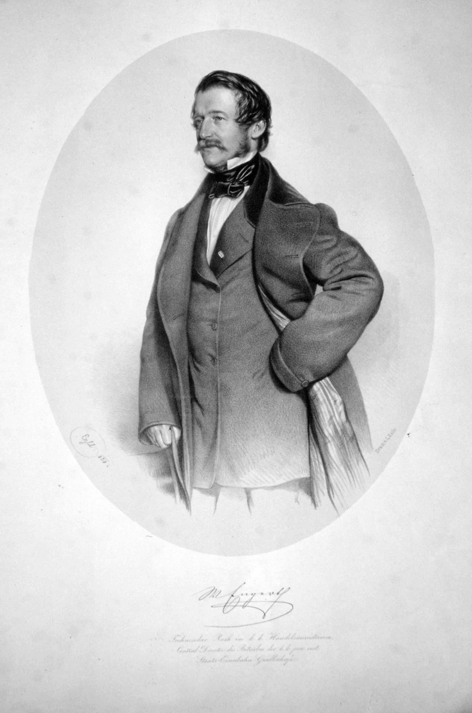 Wilhelm Freiherr von Engerth (1814-1884), österreichischer Maschinenbauer, Generaldirektor der k. k. Staatsbahnen, Arlbergtunnel. Lithographie von Franz Eybl, 1858